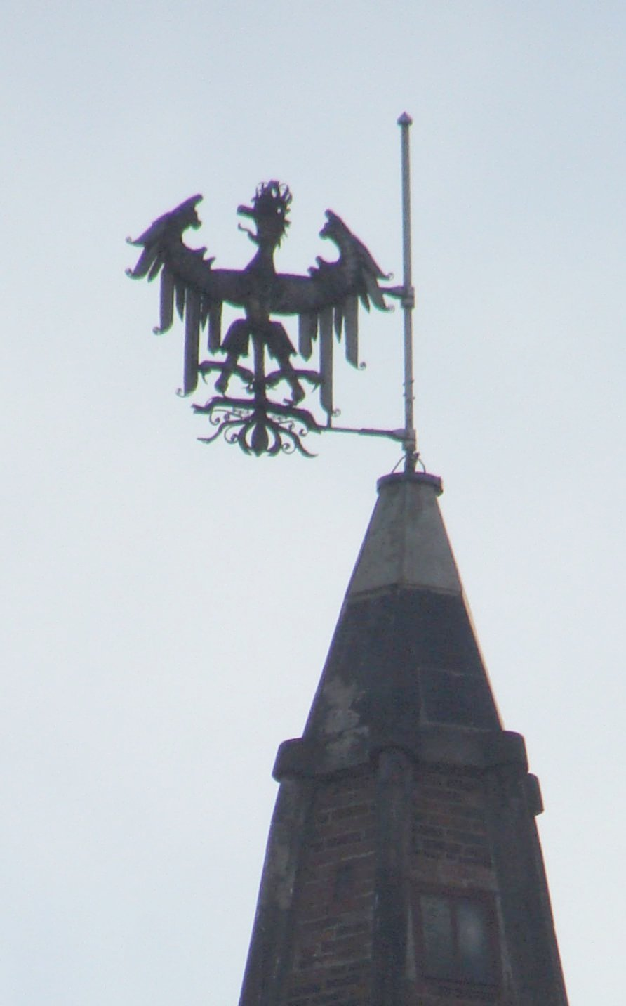 Orzeł z Wieży Piastowskiej w Opolu autorstwa Mariana Nowaka.